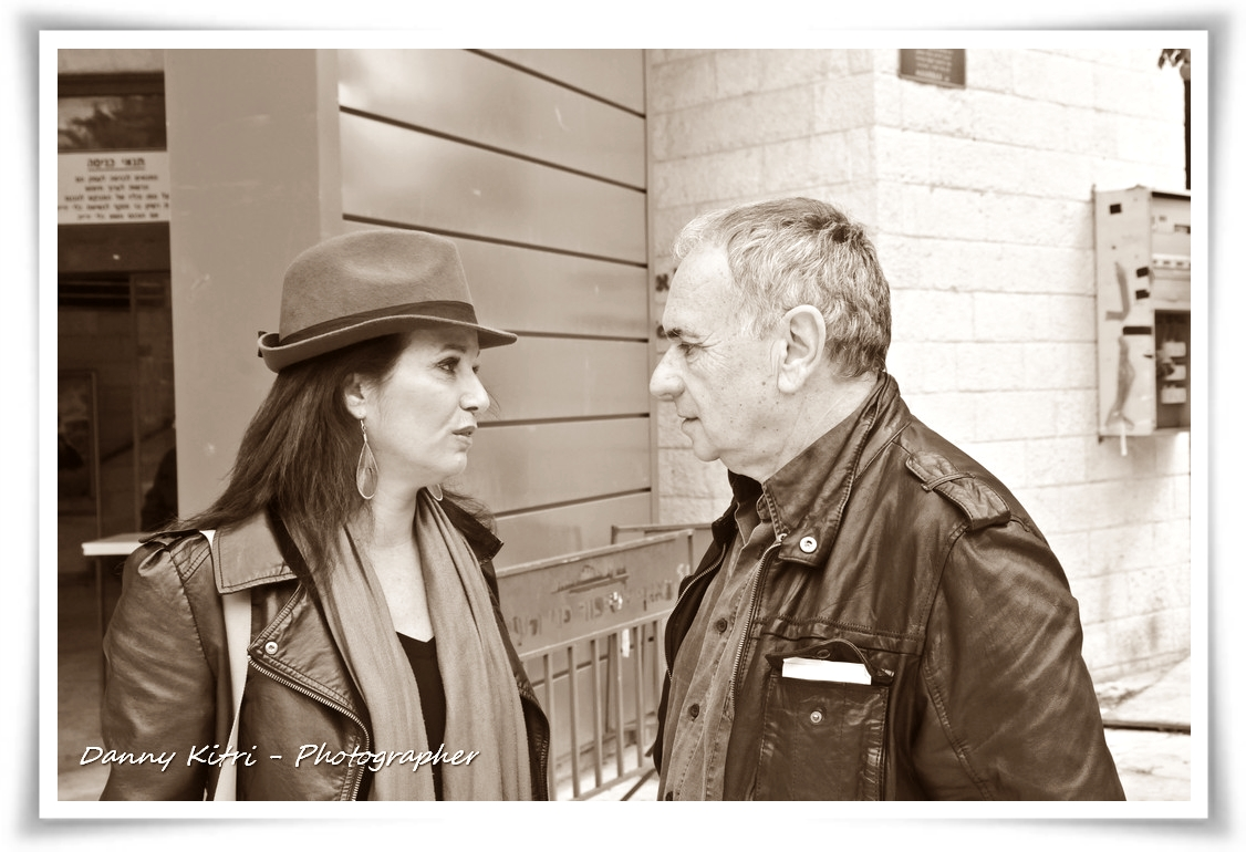 שלומית טריגר-הגואל וטומי לנג מתוך הפרימיירה של טייארה